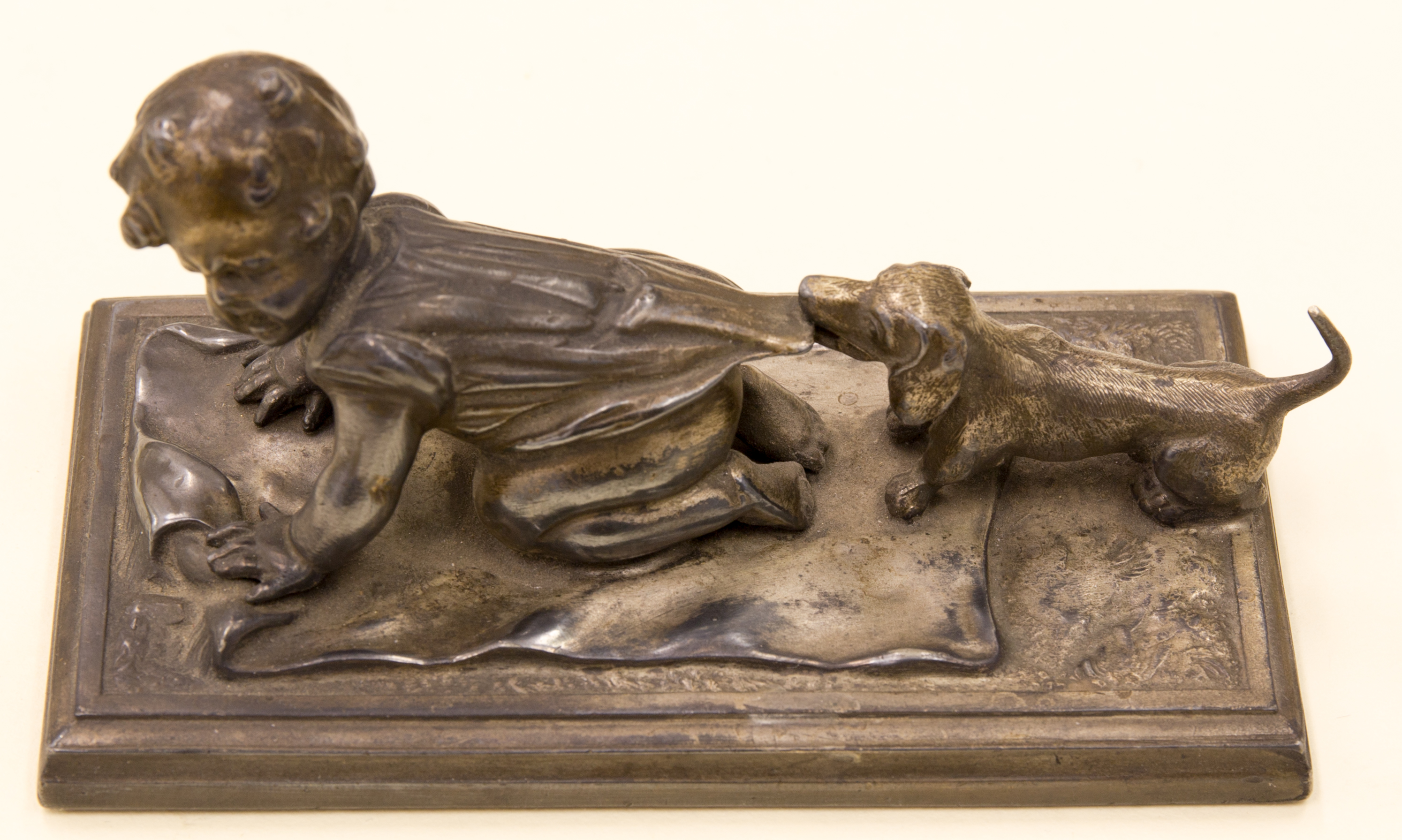 Briefbeschwerer Indetifikations-Nr.: D (9 A) 196/1981, 1 Herstellungsort: Berlin Höhe x Breite x Tiefe: 5 x 10,5 x 5,5 cm Ausgabe: Metall Zustand: 2. leichte Schäden / befriedigend Beschreibung: Briefbeschwerer, rechteckige Grundplatte, darauf kniet ein kleines Kind mit aufgestützten Händen, hinten zieht ein kleiner Hund das Kind am Hemd.